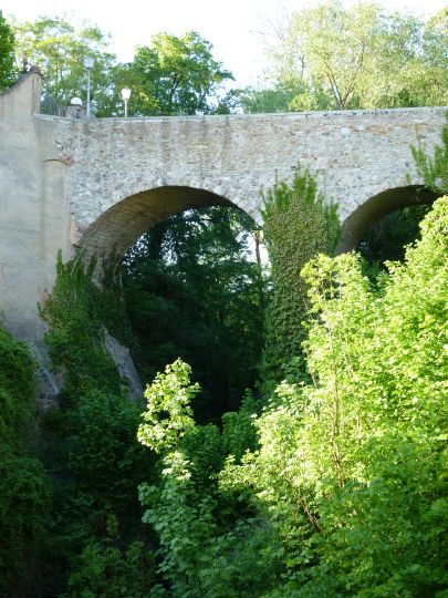 Brücke über das Mutzschener Wasser zum Schloss in Mutzschen